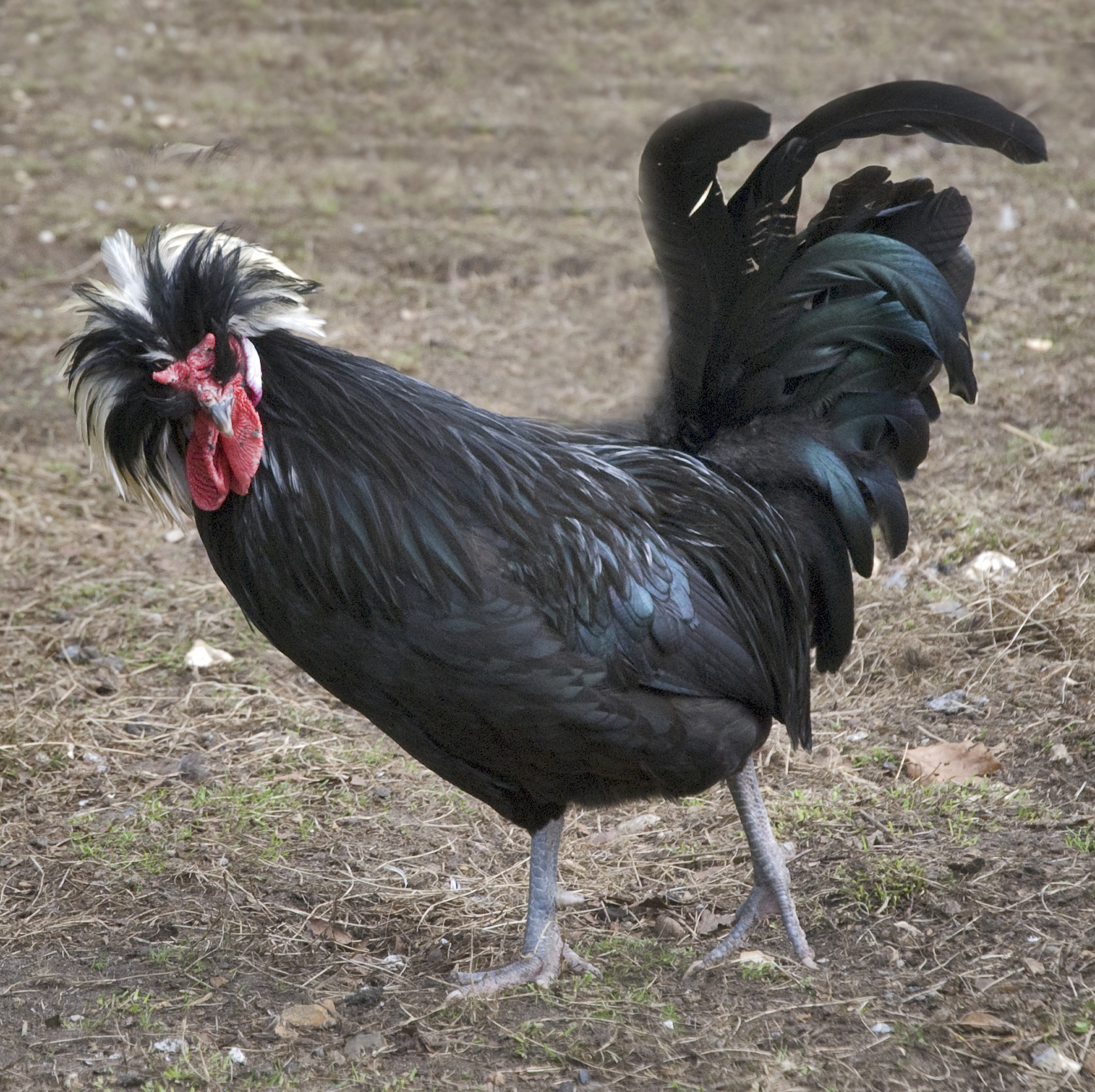 Cockerel